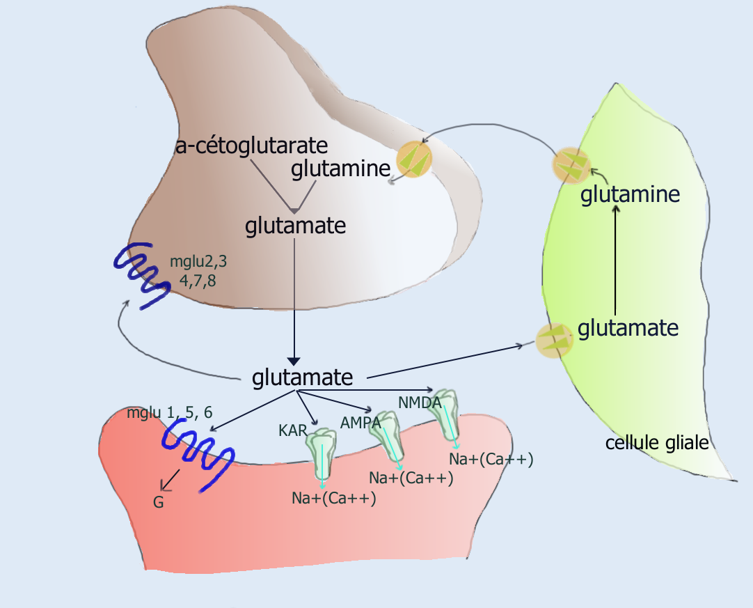 Synapse glutamatergique